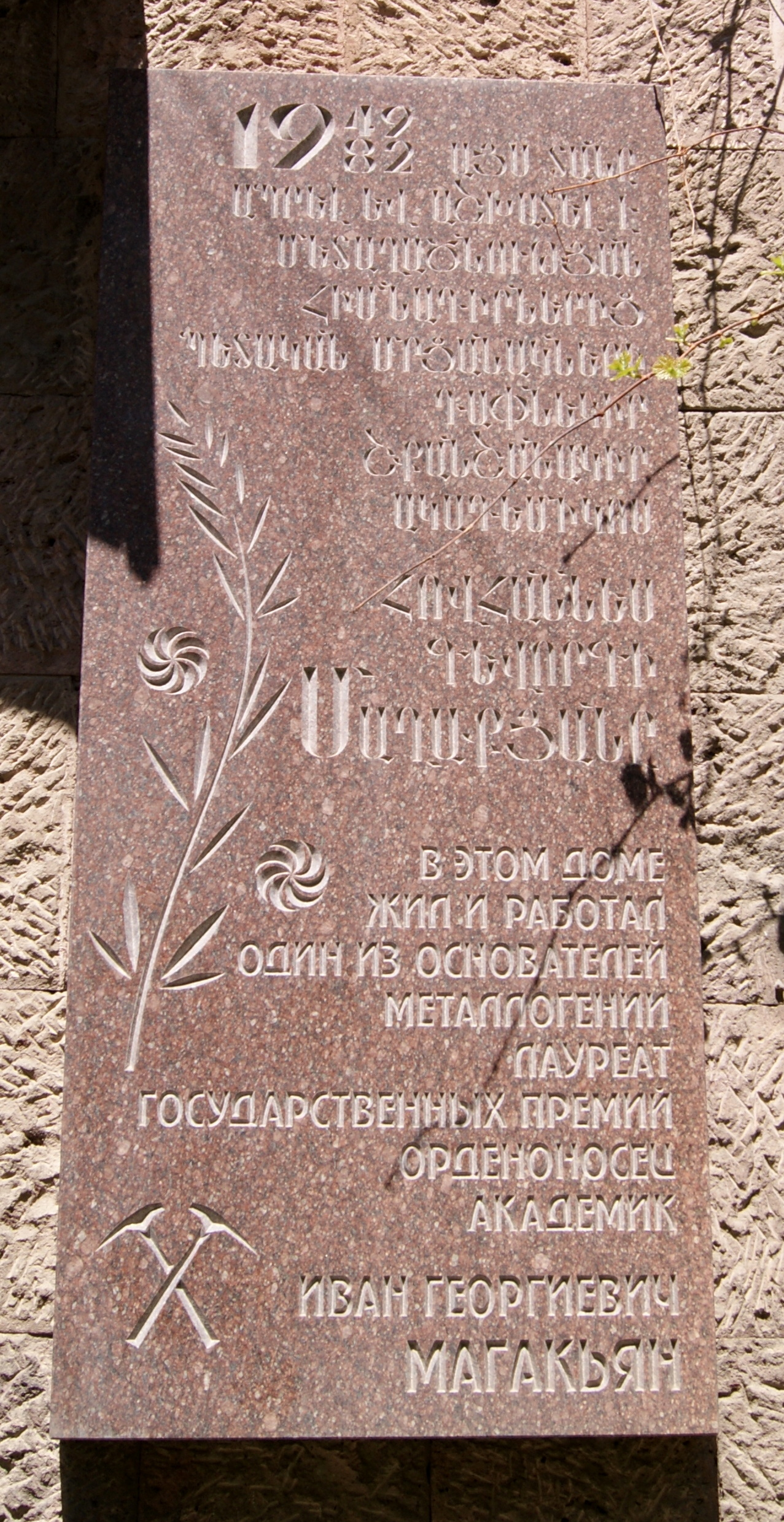 Hovhannes Maghakyan's plaque on Baghramyan avenue